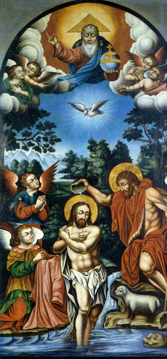 Картина Овнатана Овнатаняна